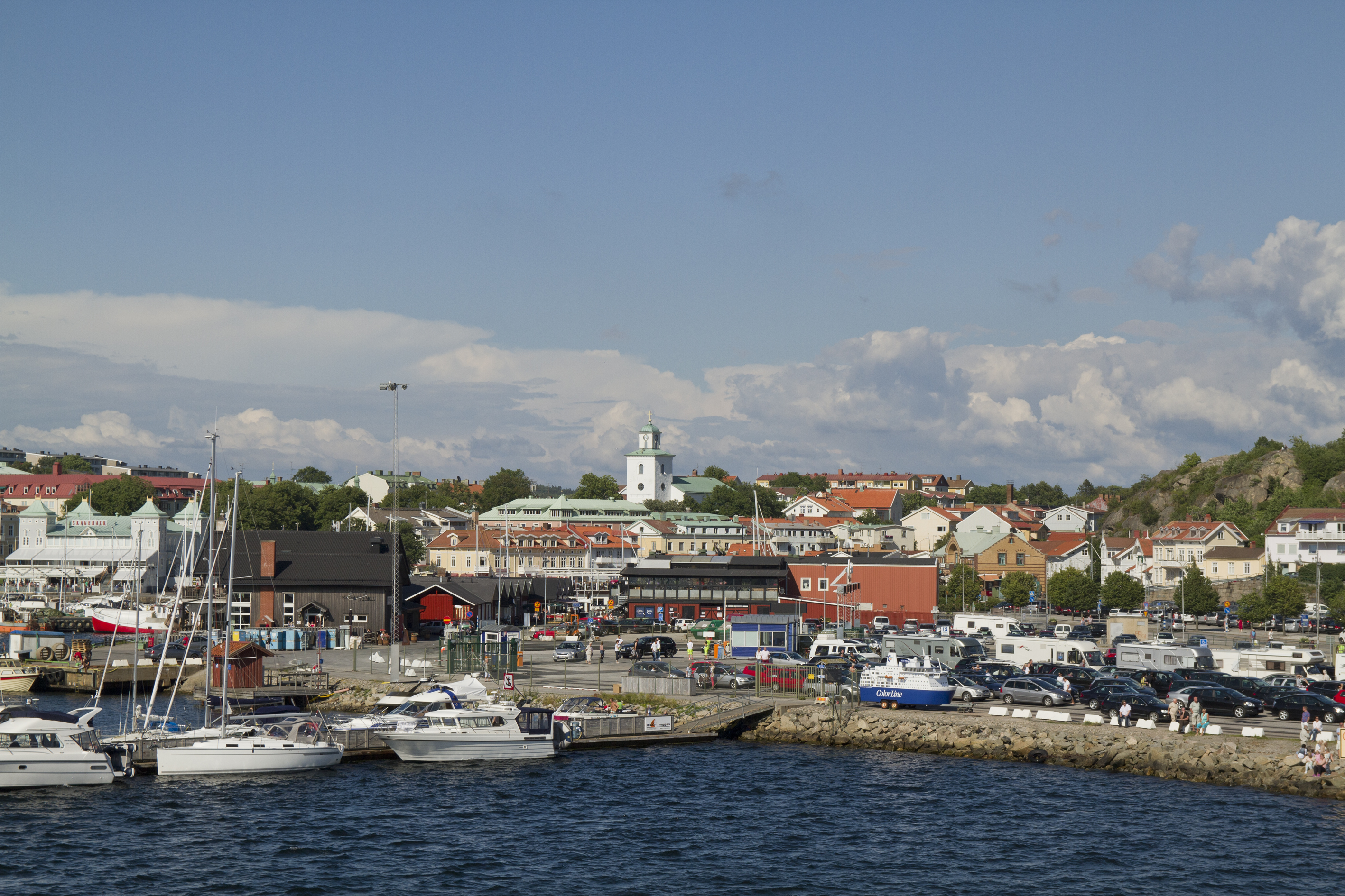 Strømstad